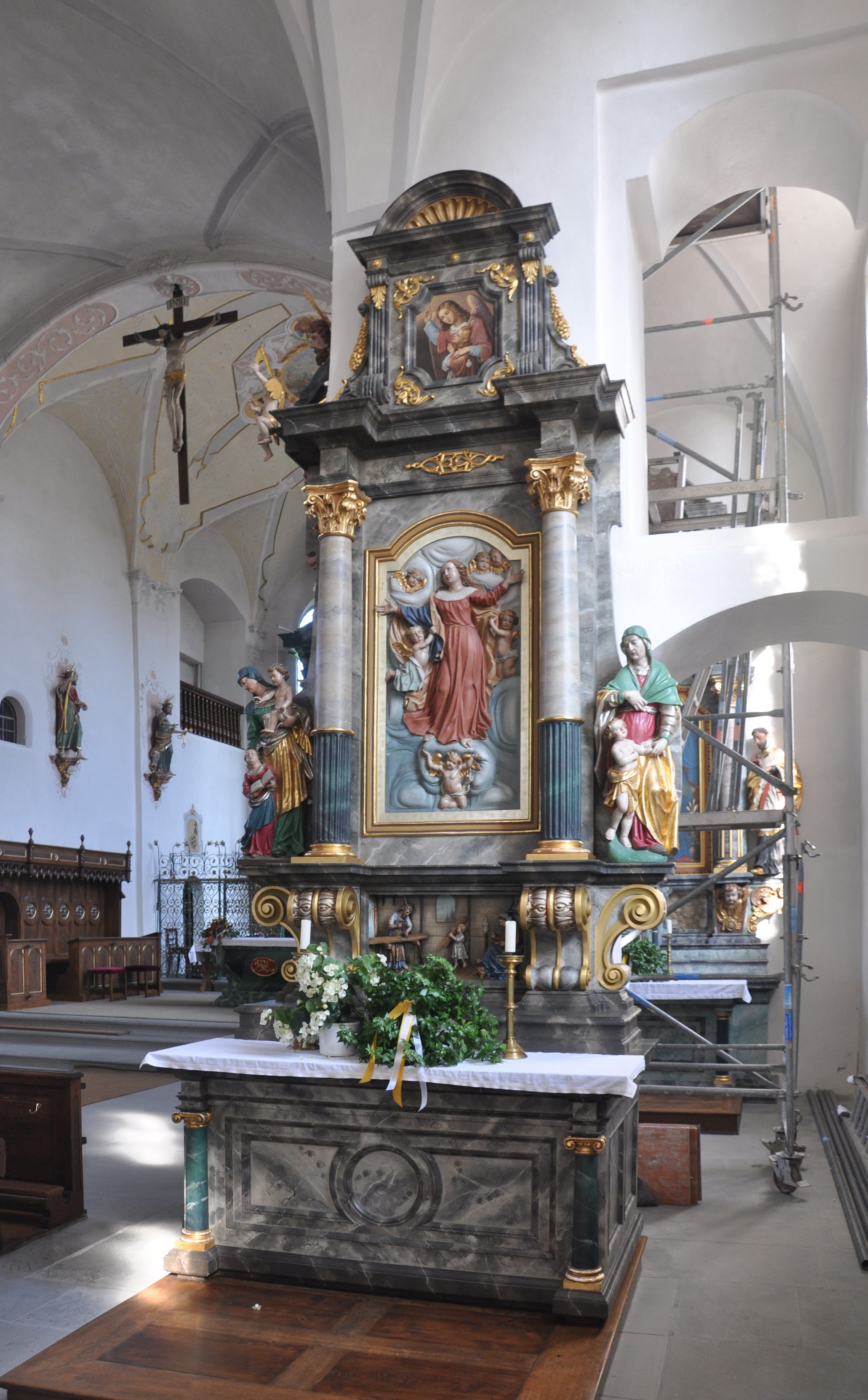 Pfärrich (Gemeinde Amtzell), Pfarr- und Wallfahrtskirche Mariä Geburt Seitenaltar rechts hinten von 1850, Oberbild "Schutzengel" von Maria Carolina Freudenreich (1886), Relief "Aufnahme Mariens in den Himmel" (unbekannter Künstler, um 1900?), Predella-Relief "Haus Nazareth" von Theodor Schnell d. Ä. (1900), Seitenfiguren hochbarock (um 1685)